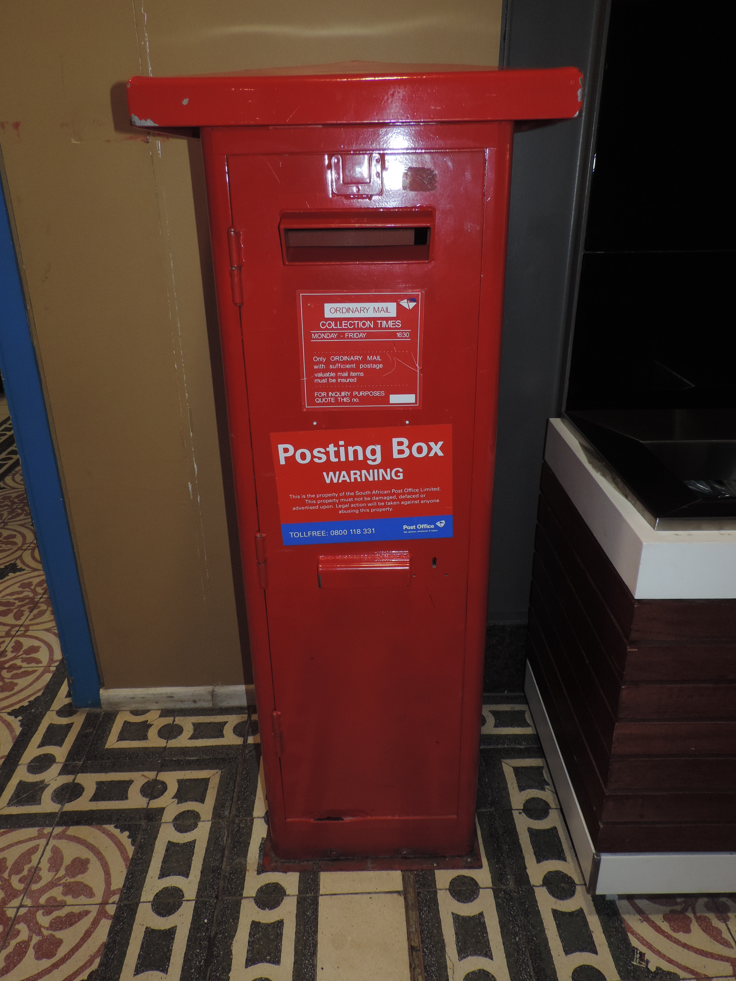 Boîte aux lettre, Le Cap, Afrique du Sud, 2016